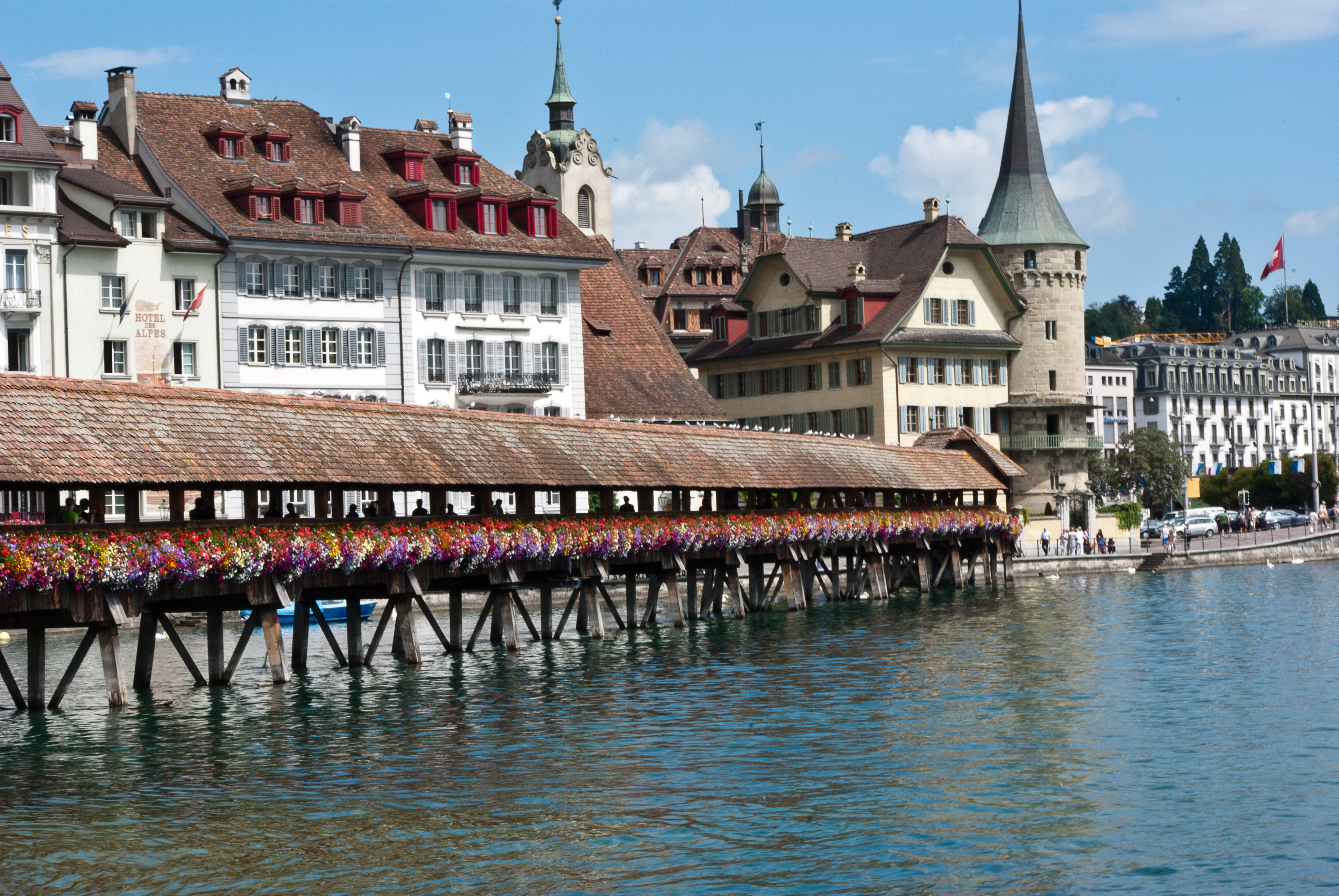 Das Bild zeigt die Kappelbrücke in Luzern (Schweiz). Diese Brücke ist die älteste und zweitlängste Holzbrücke Europas.